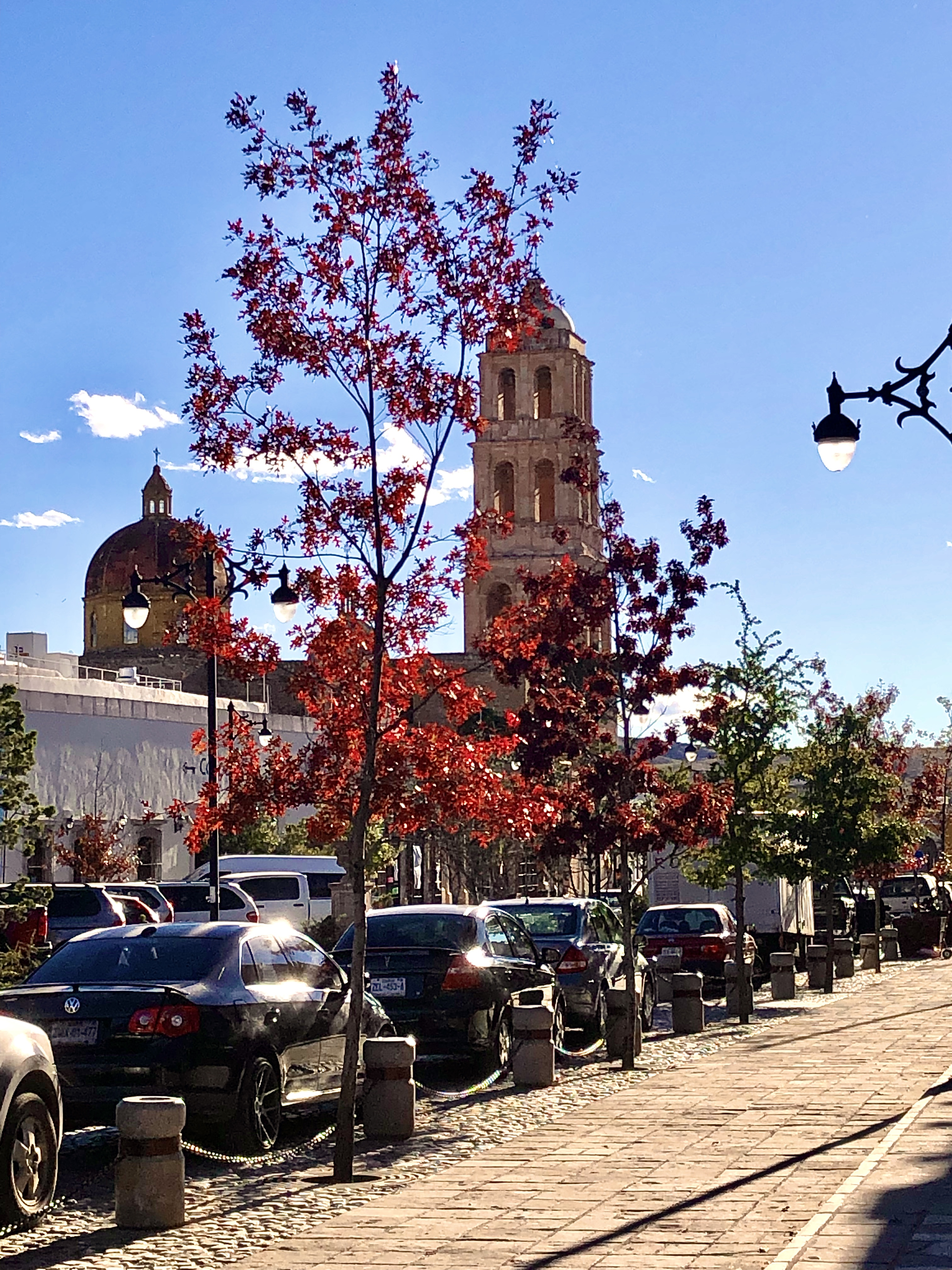 Otoño con encinos rojos en Sombrerete, Zacatecas, México